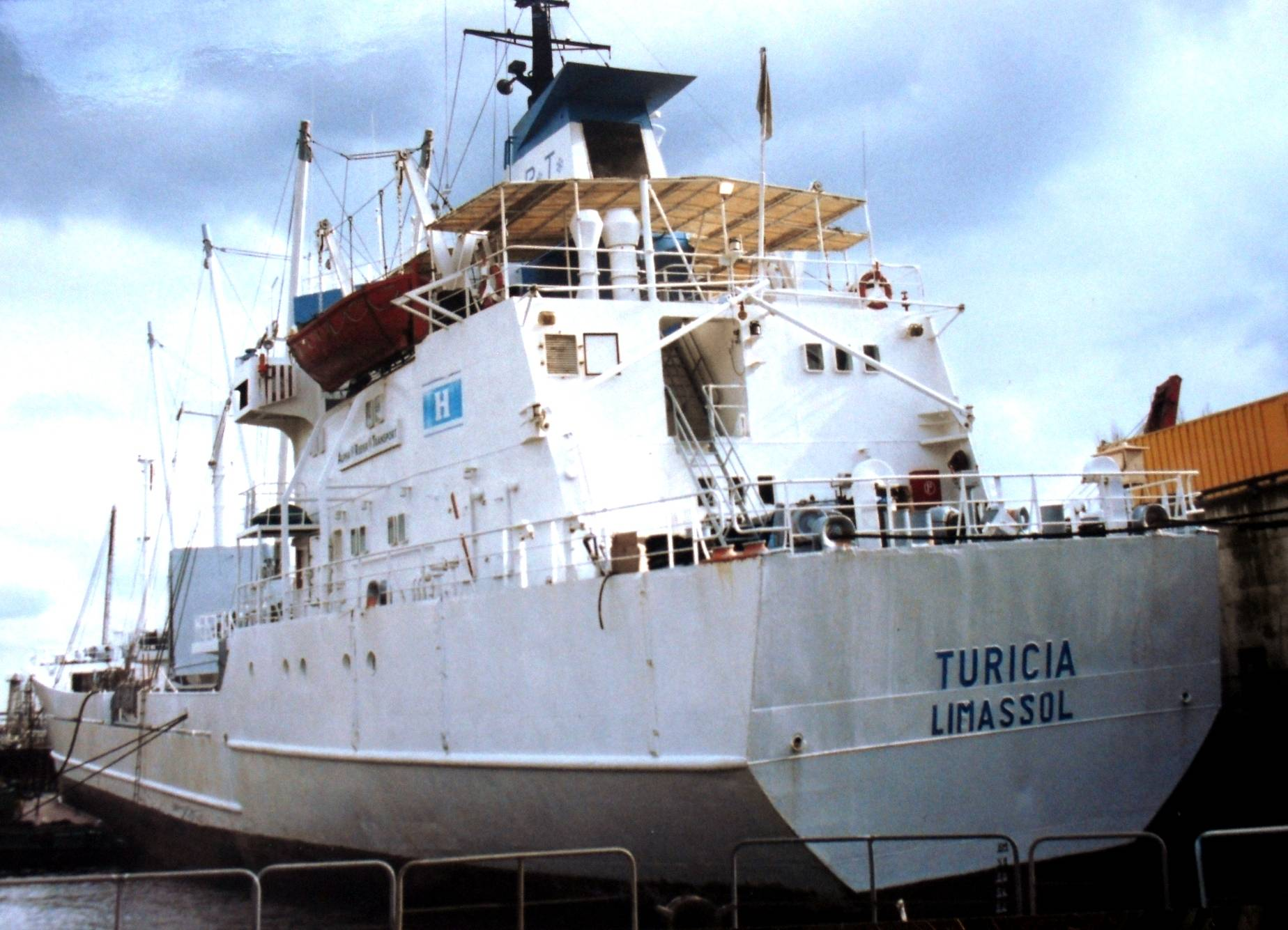 Kühlschiff TURICIA IMO Number:7700104